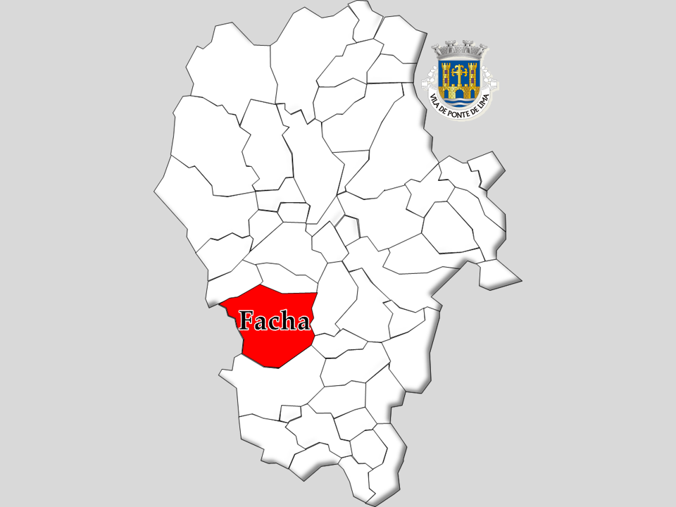 Censos 1864/2011